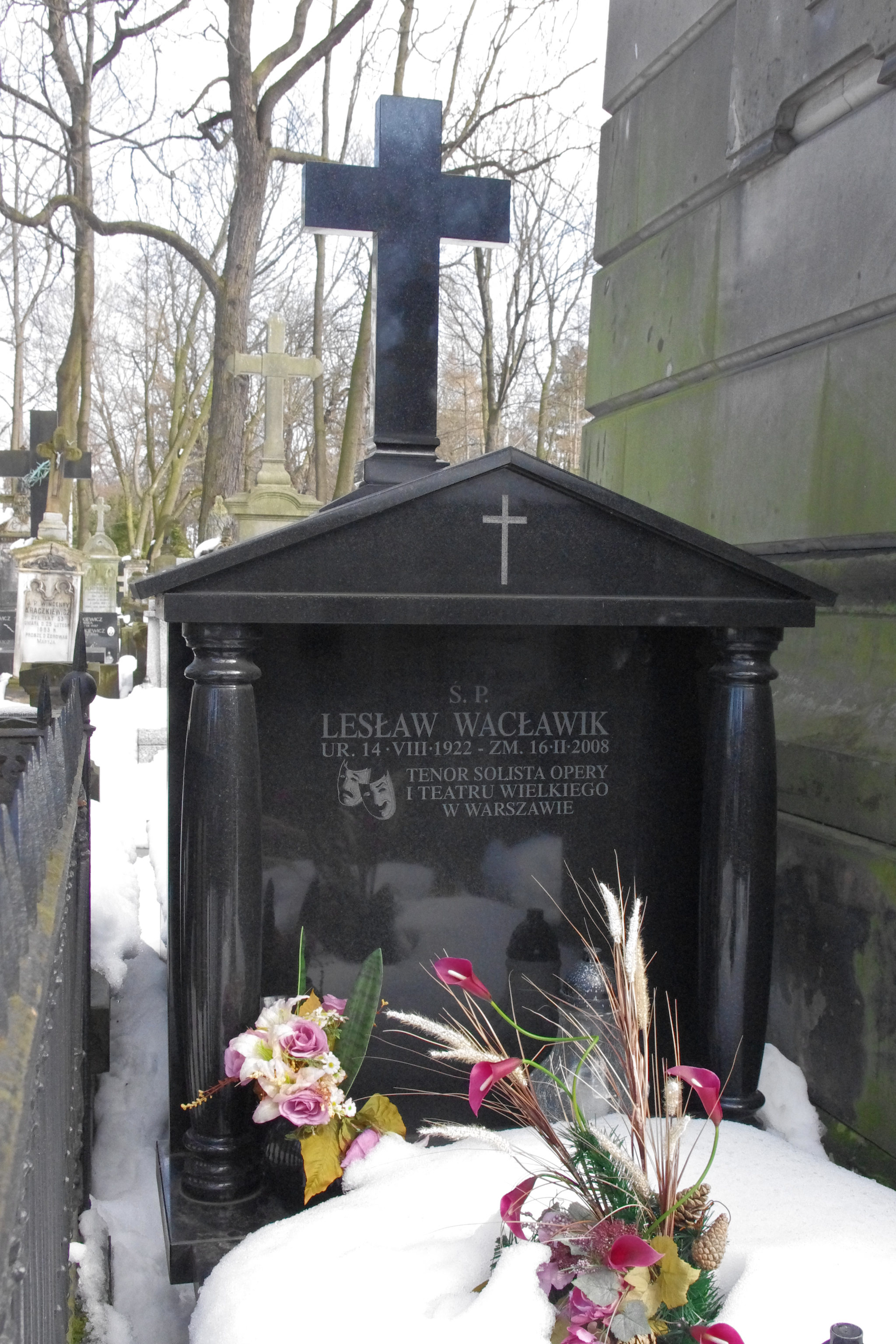 Grób śpiewaka operowego Lesława Wacławika (1922-2008) na Cmentarzu Powązkowskim w Warszawie